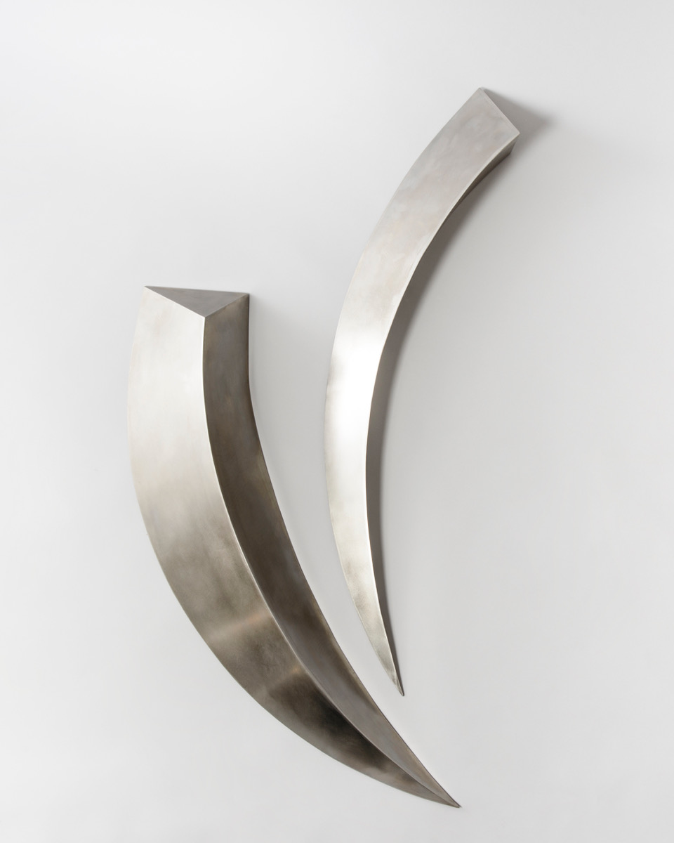 Magdalena Więcek, Bass Relief III, 2007, stal, 80 x 70 x 10 cm